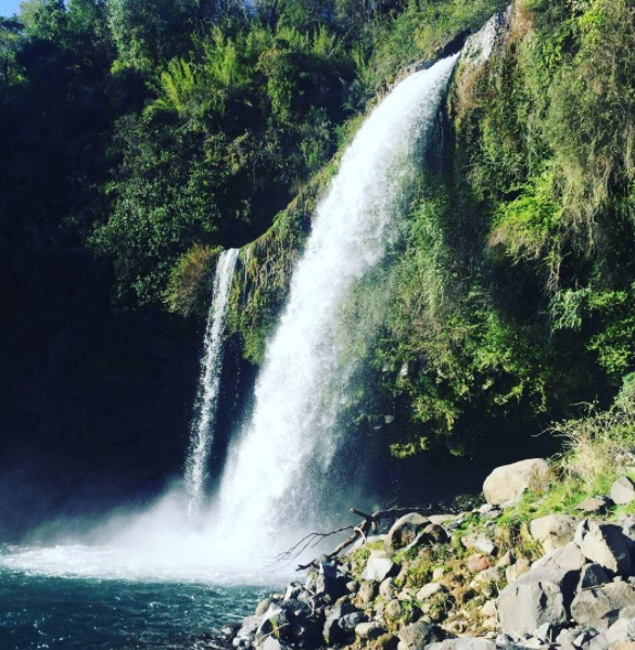 Salto del rio Renegado, caida de agua de más de 40 metros de altura.